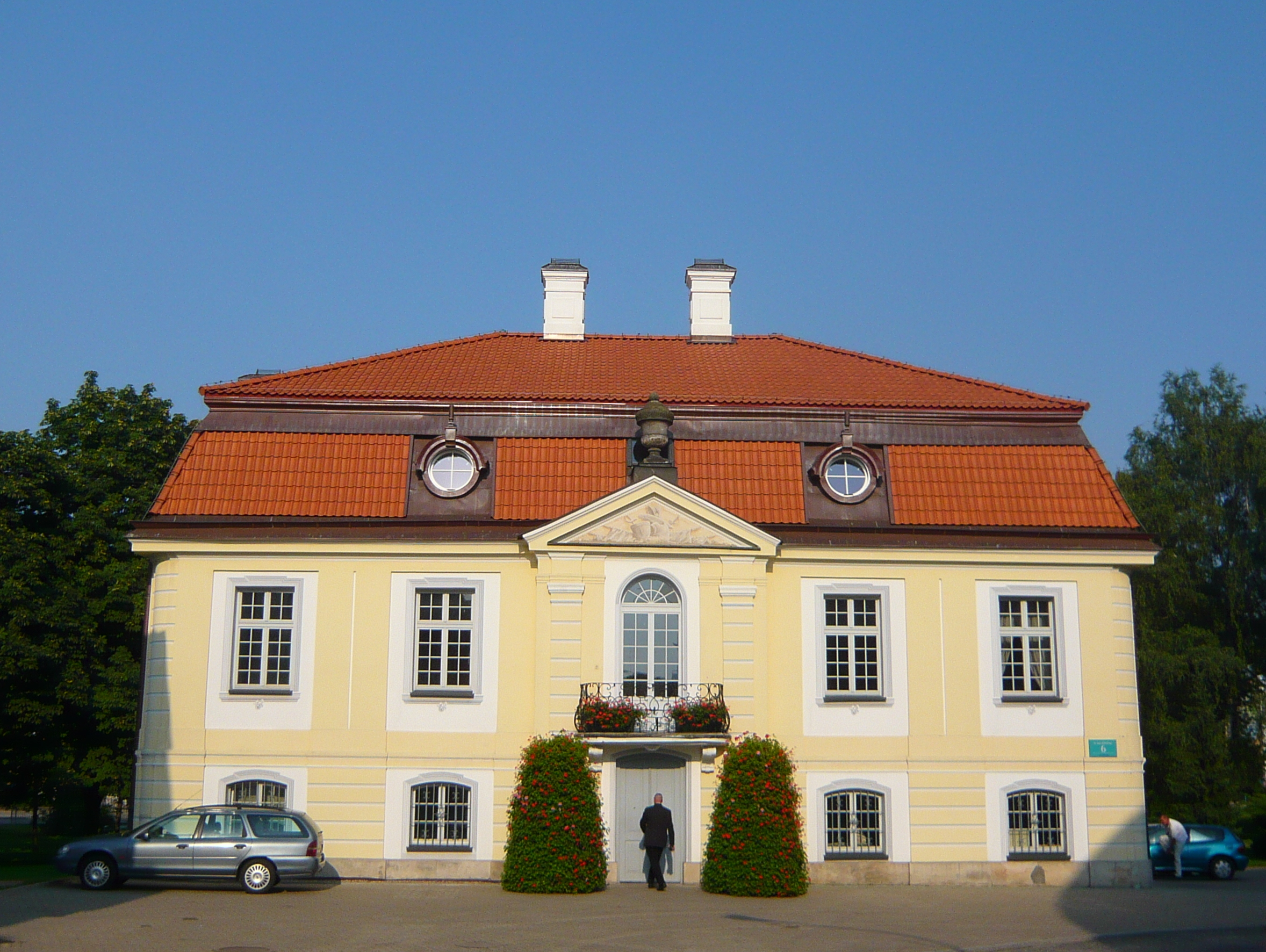 Беларуская (тарашкевіца): Гасьцявы палац Браніцкіх у Беластоку.